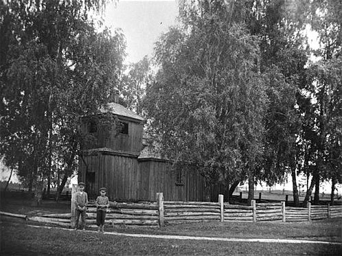 Беларуская (тарашкевіца): Хоўхла